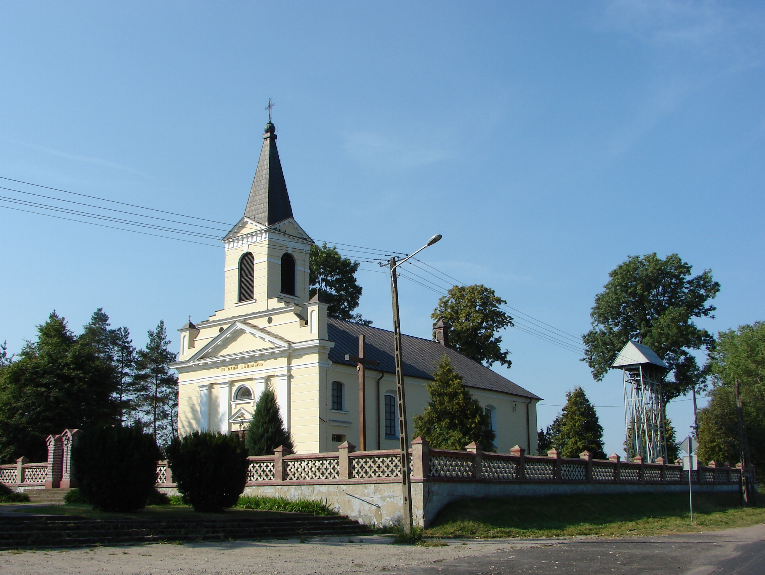 Rdutów, kościół par. p.w. św. Jana Chrzciciela, 1800